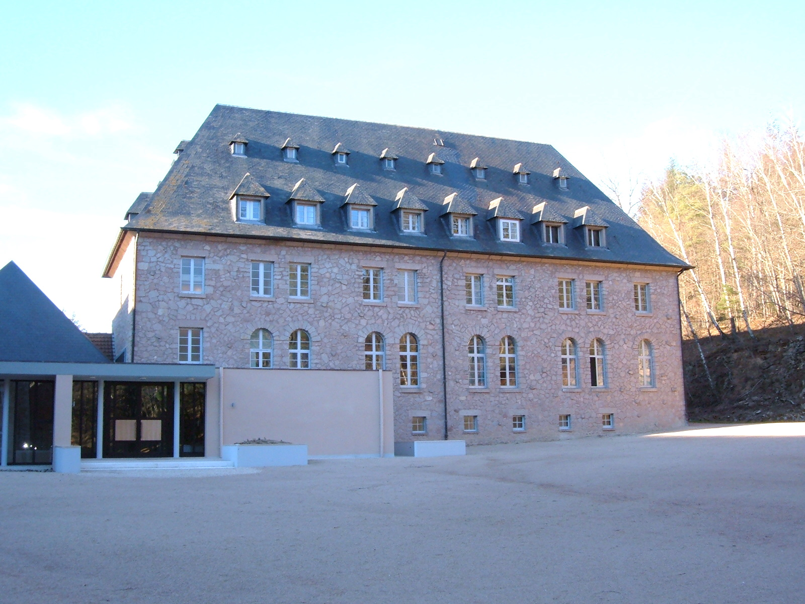 Abbaye Sainte-Marie de la Pierre-qui-Vire, Yonne : l'hôtellerie